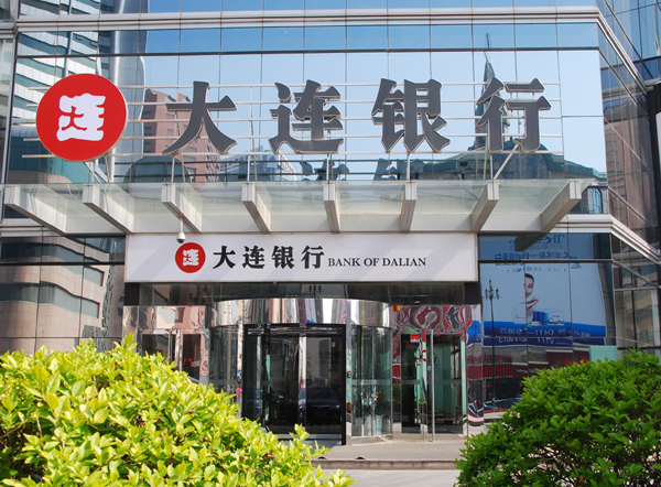 Dalian Bank, China